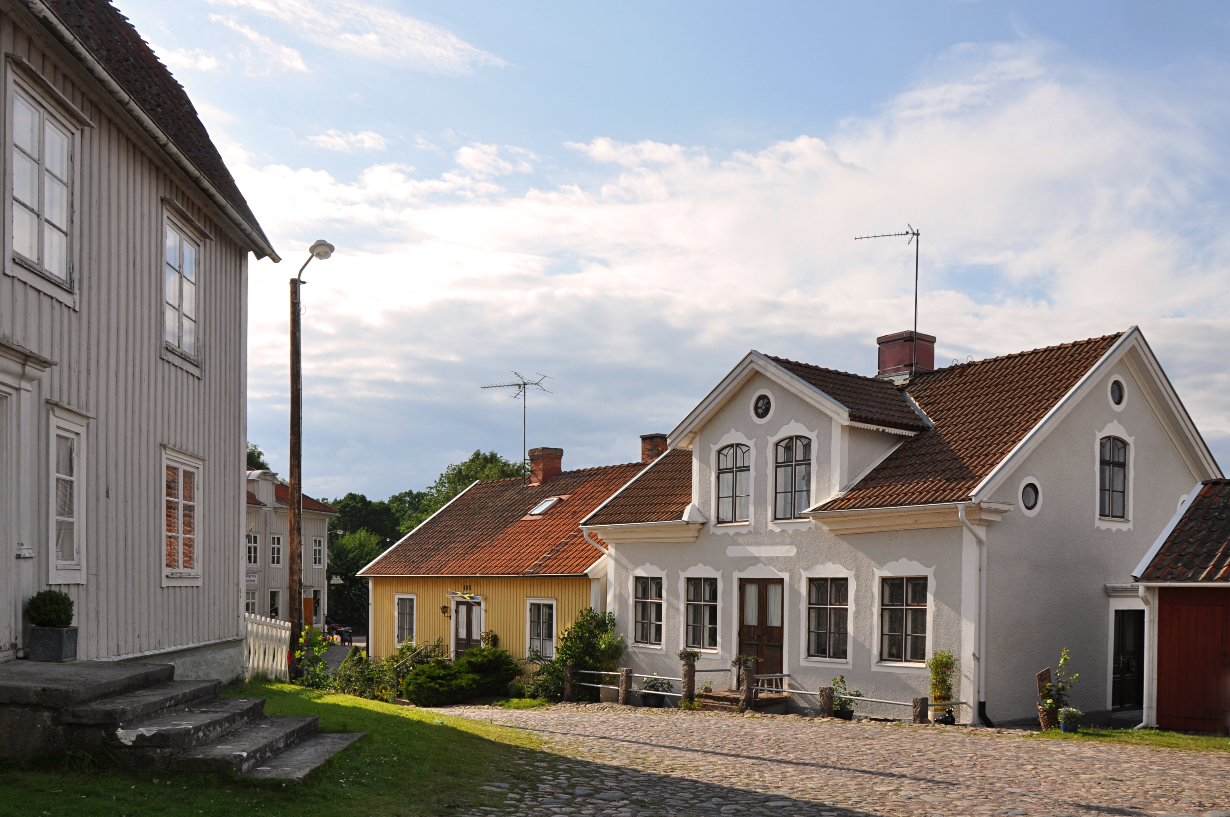 Pataholm ligger vid Kalmarsund i Mönsterås kommun, Sverige.